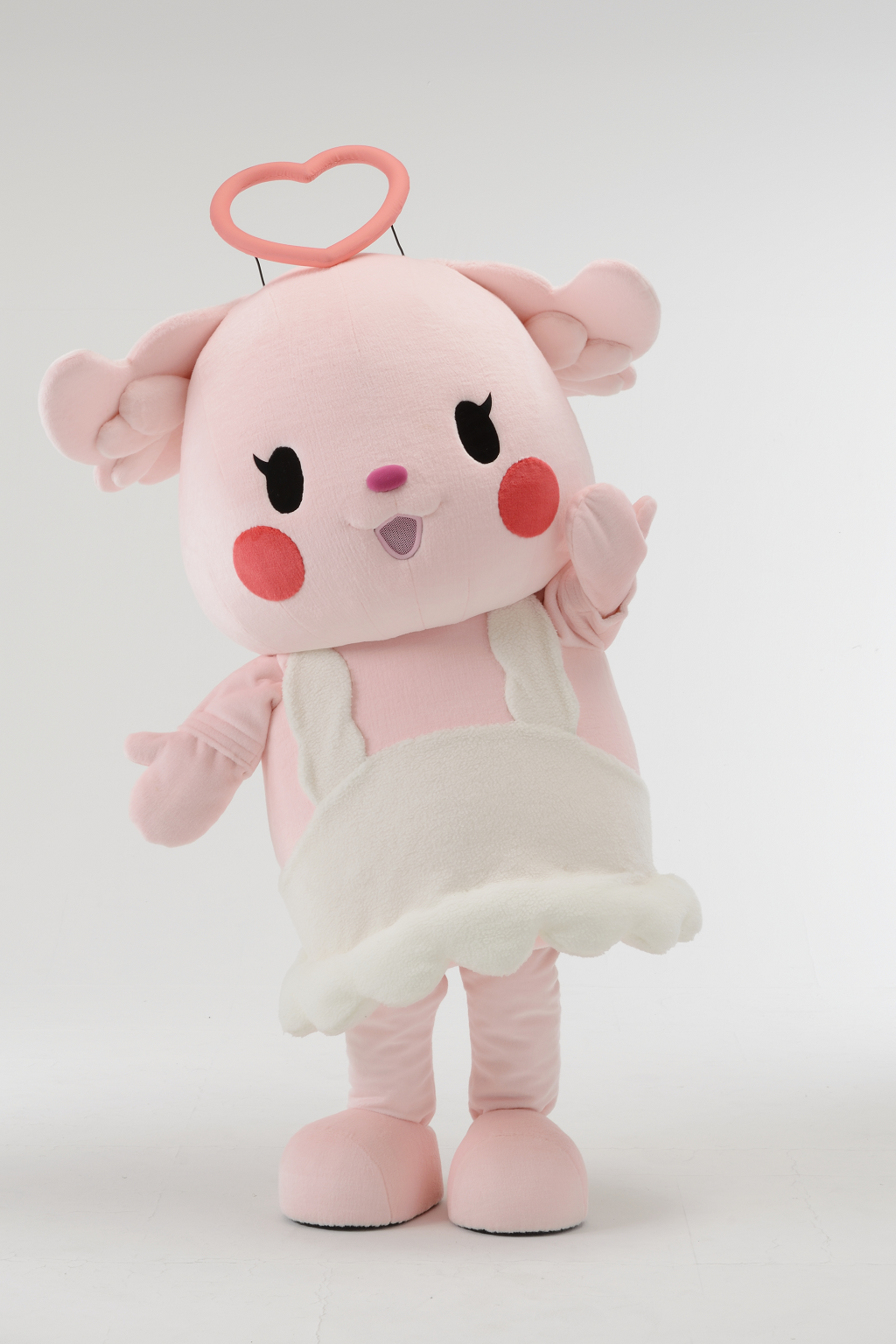 みあう～ちゃん